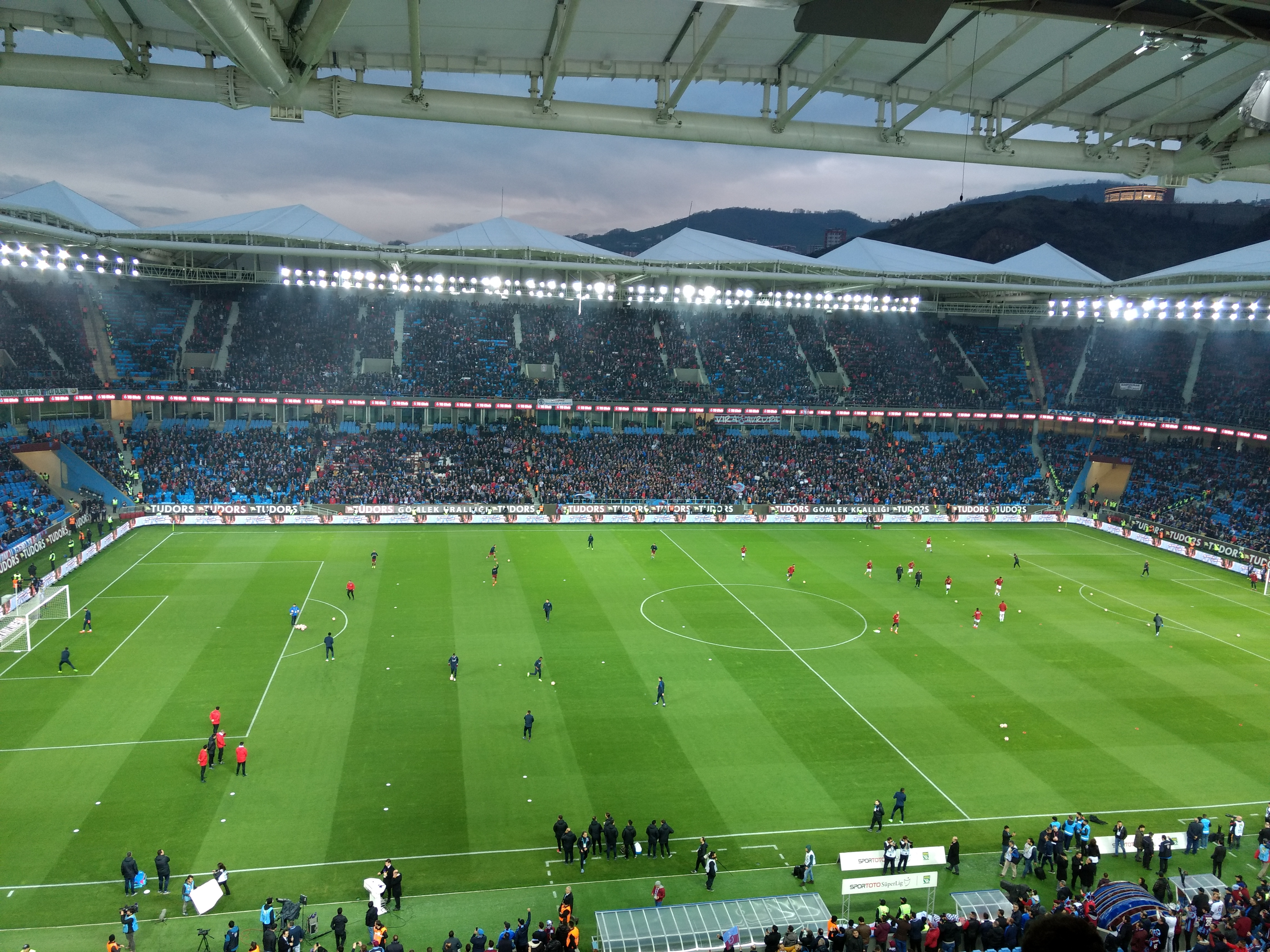 18 Mart 2017 tarihli Trabzonspor - Galatasaray maçından bir görünüm.